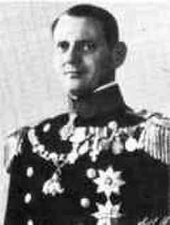 Frederik IX of Denmark